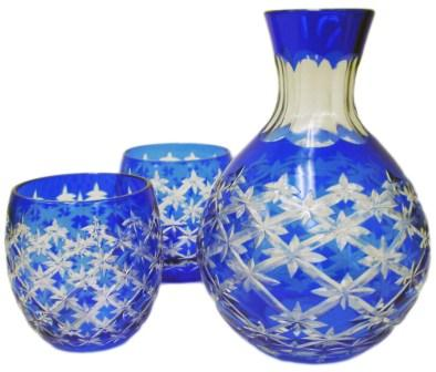 Ceramic Sake Set made in Japan. Sake Sets